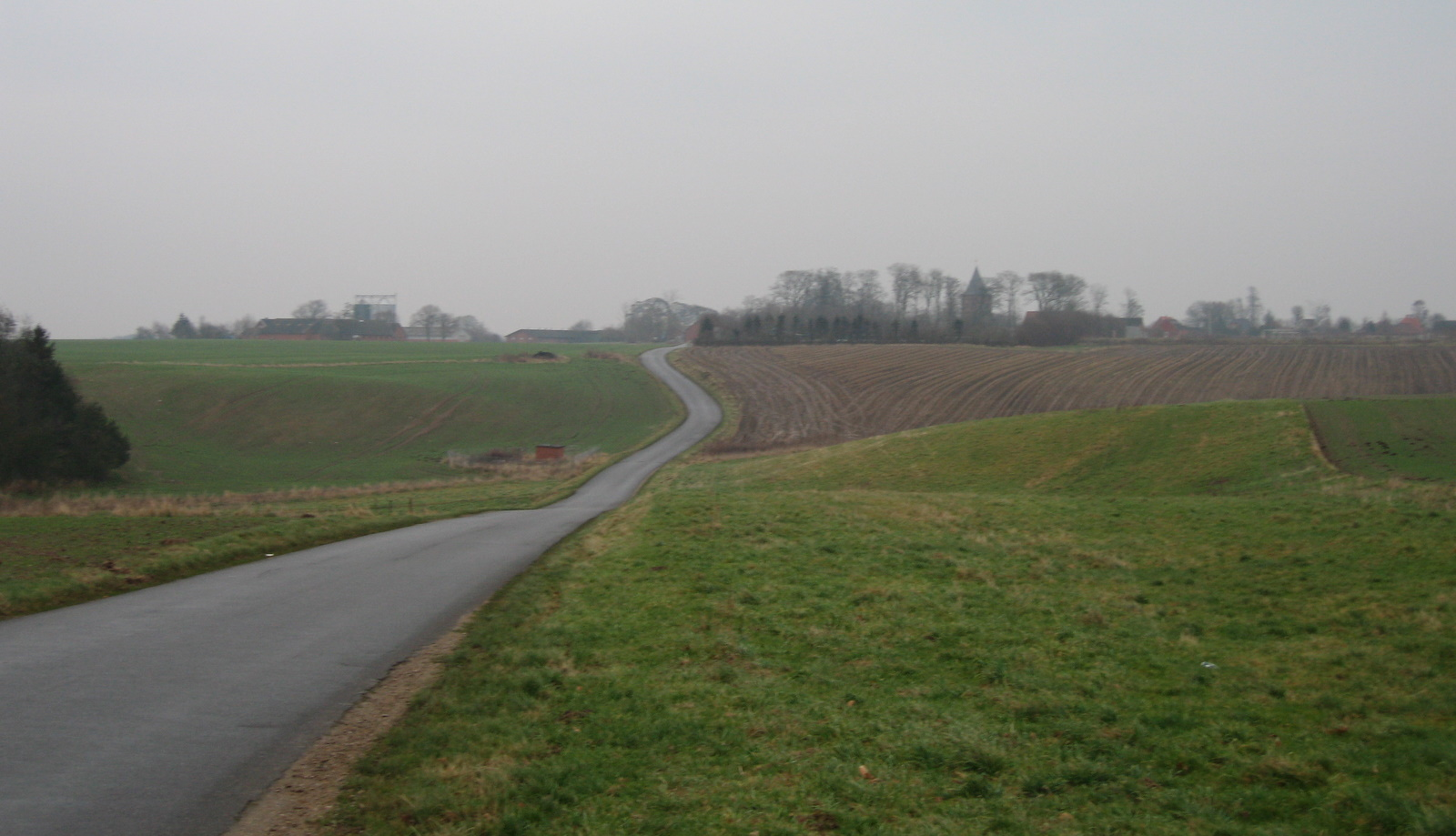 Road in Vellev in fog.